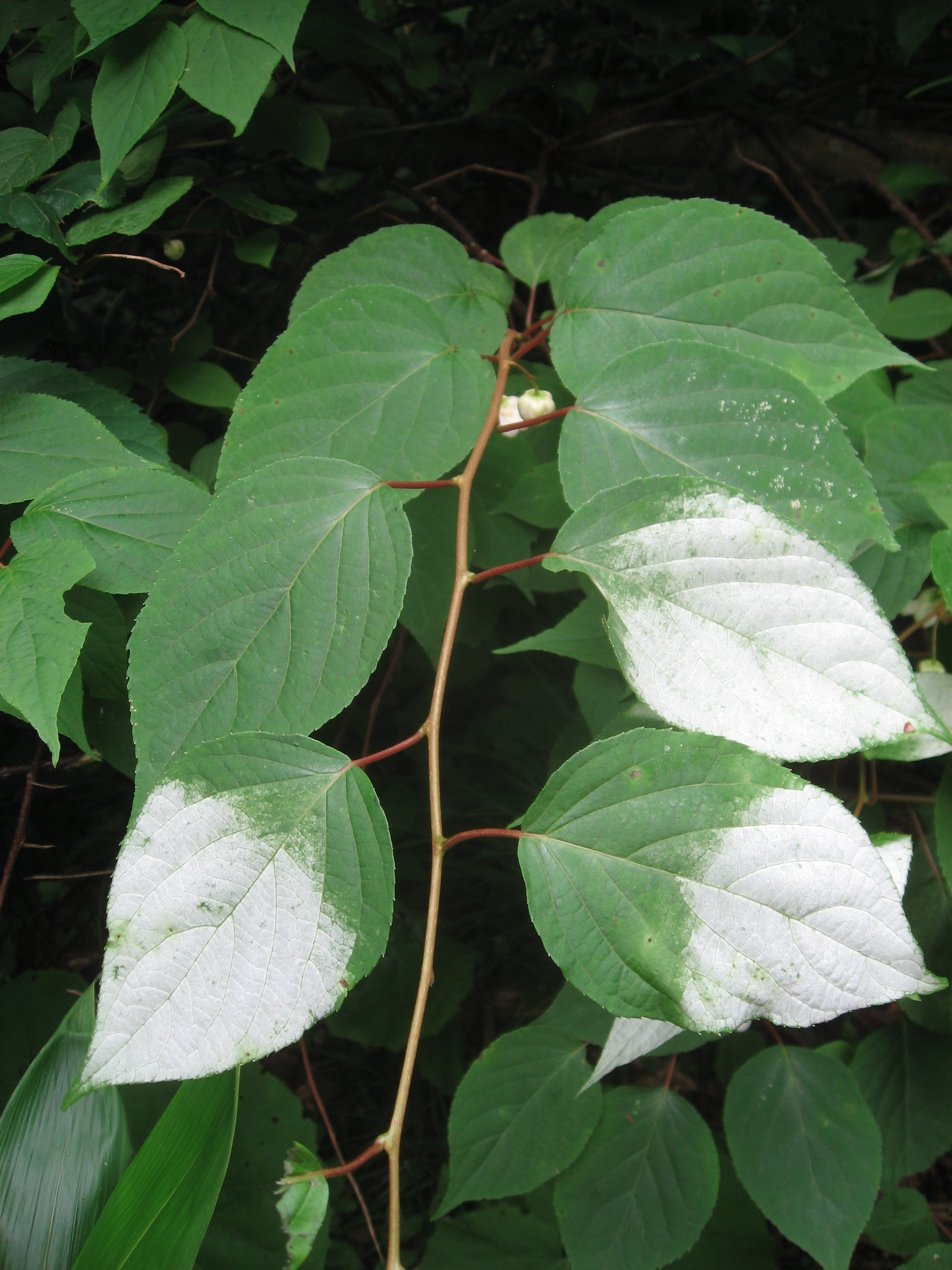 マタタビの白化した葉 福島県会津地方